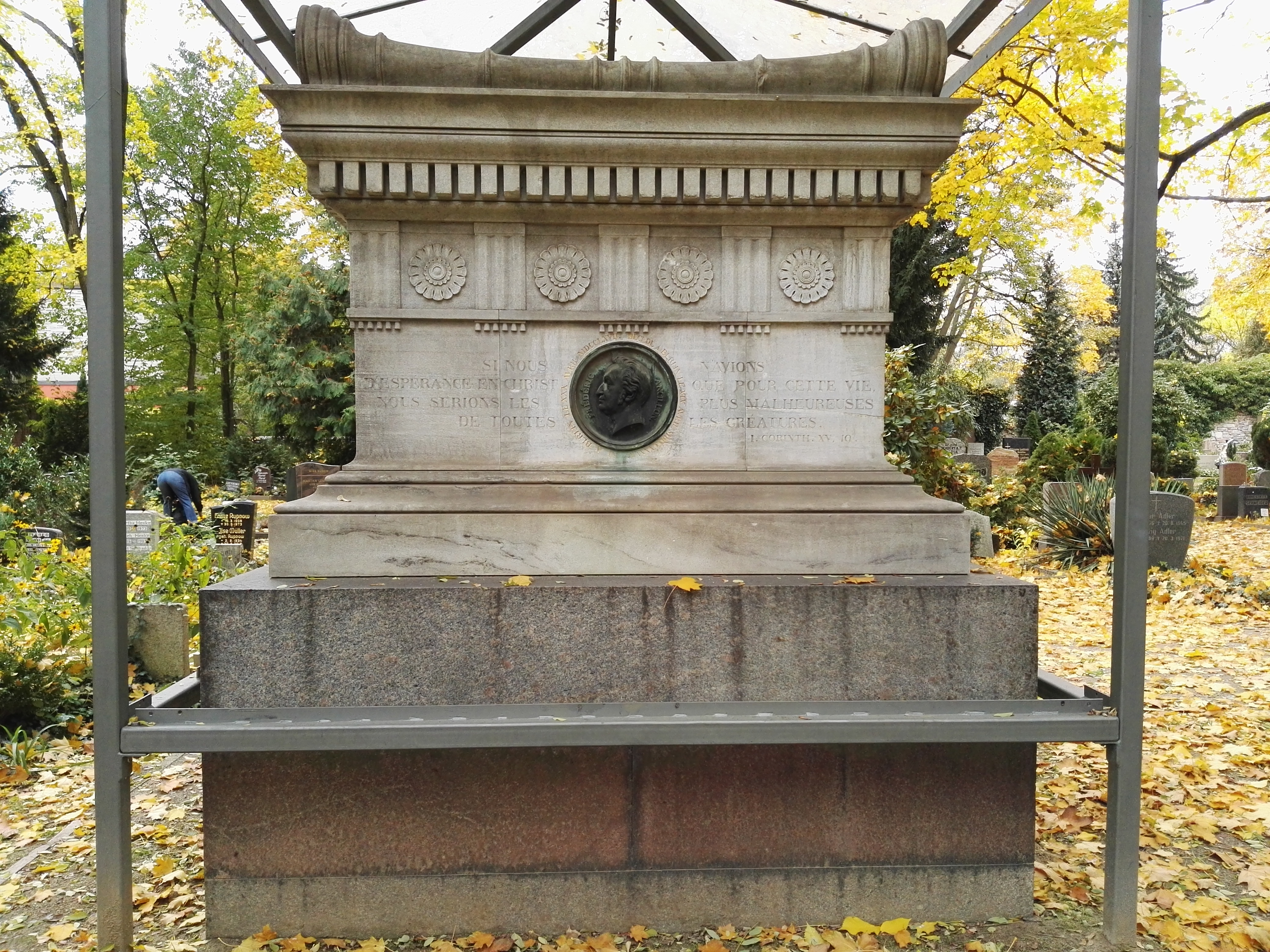 Grab von Jean Pierre Frédéric Ancillon auf dem Französischen Friedhof in Berlin-Mitte